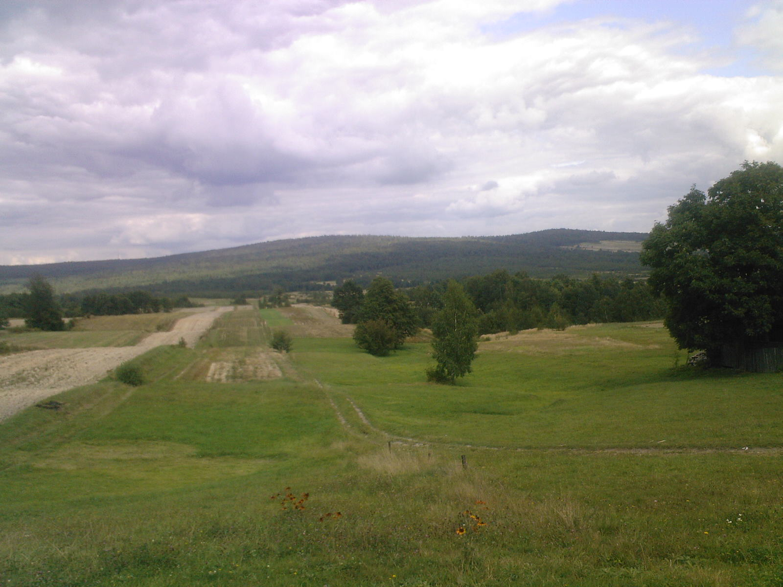 Góra Barcza. Widok z Masłowa.